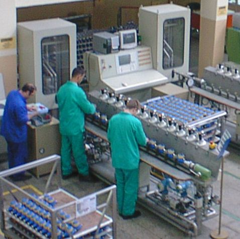 Kategori:Ölçü aletleri